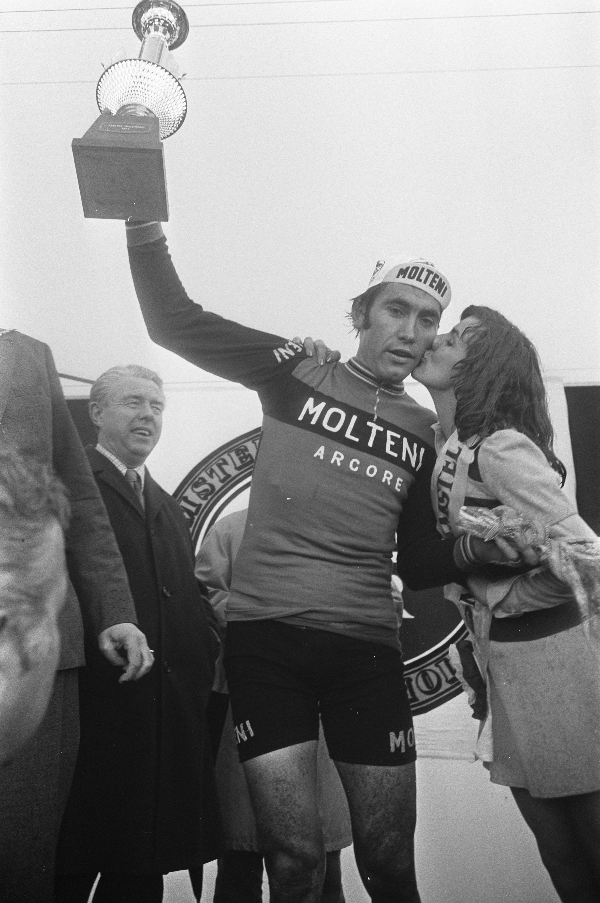 Amstel Goldrace in Limburg (wielerwedstrijd), winnaar Eddy Merckx met beker.